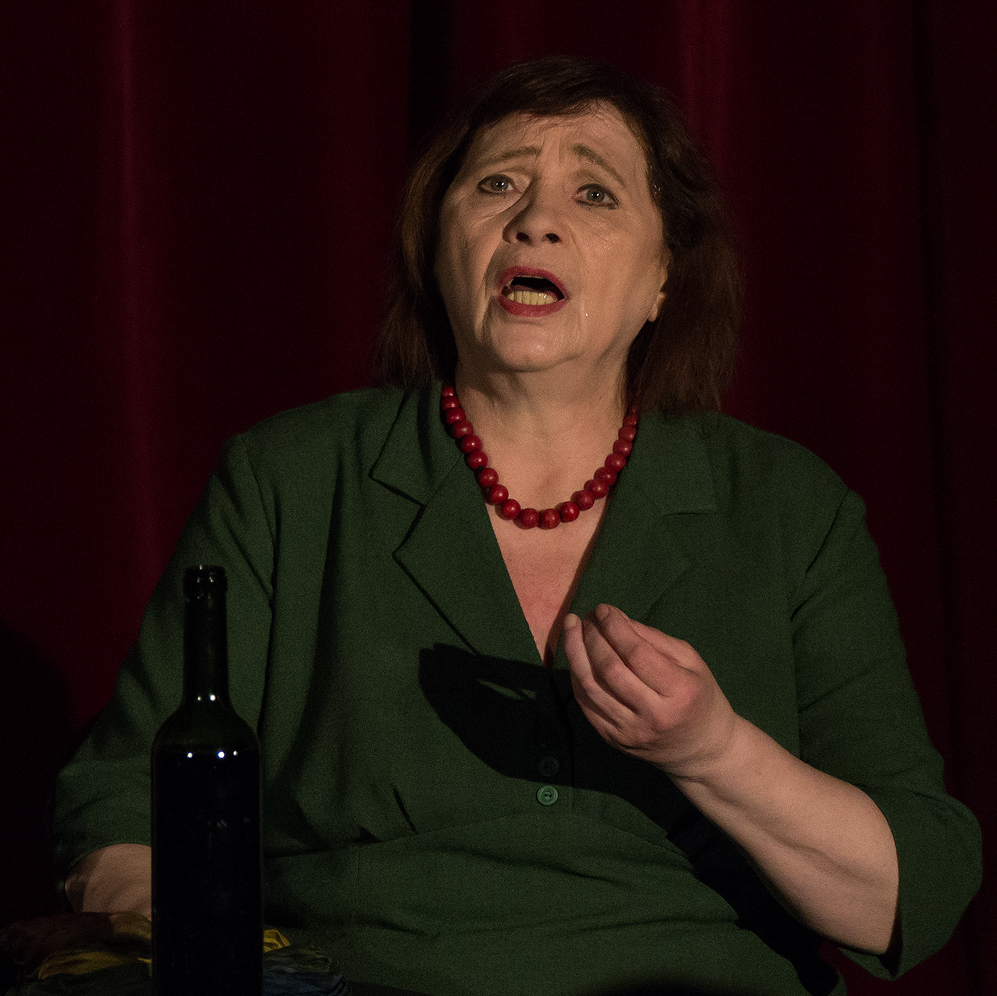 "Inger" - en reise gjennom Inger Hagerups heftige liv og poesi. Monolog i auditoriet med Wenche Kvamme, i regi av DNS.